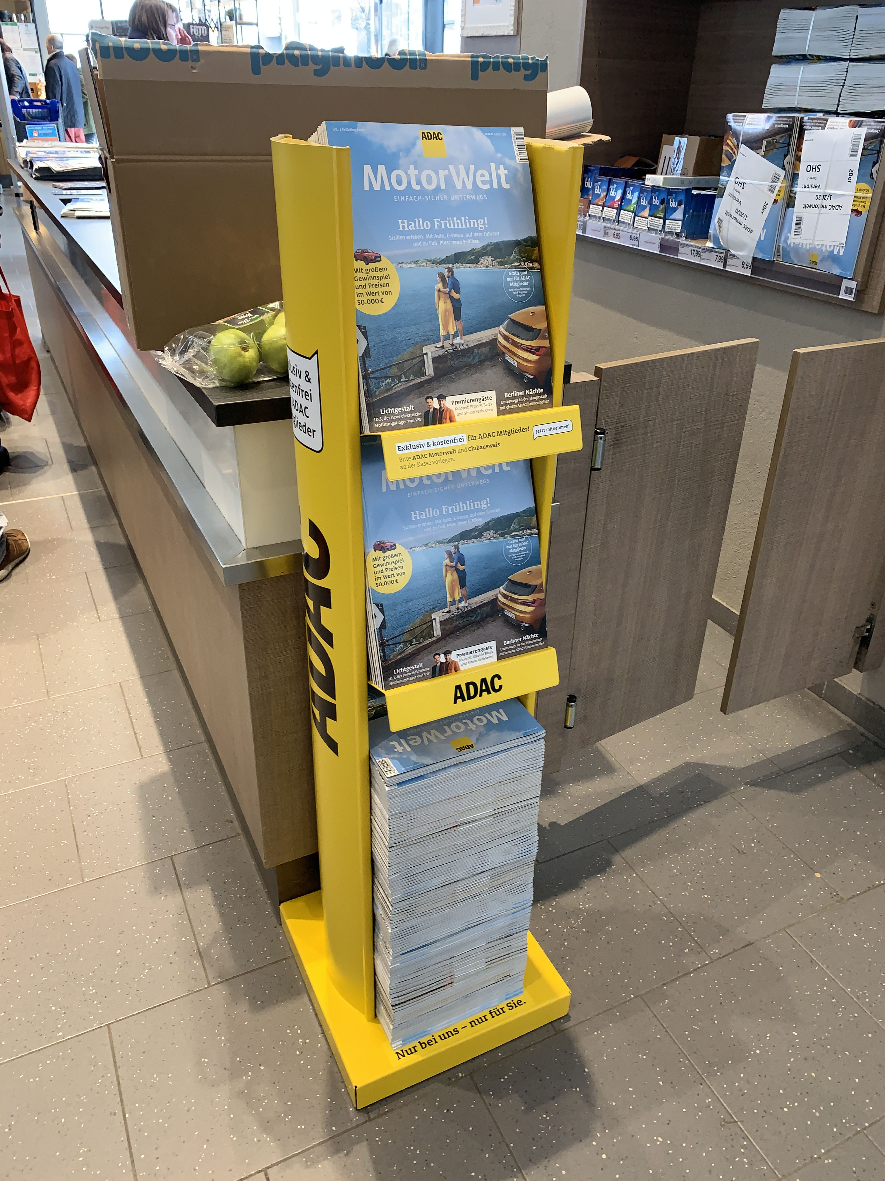 ADAC motorwelt ab 2020 im Supermarkt für Selbstabholer